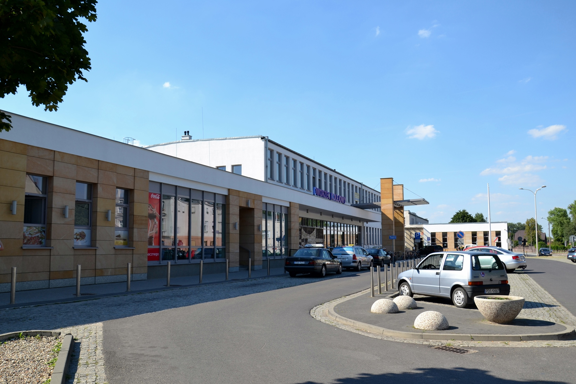 Dworzec w Ostrowie Wielkopolskim widok od strony miasta